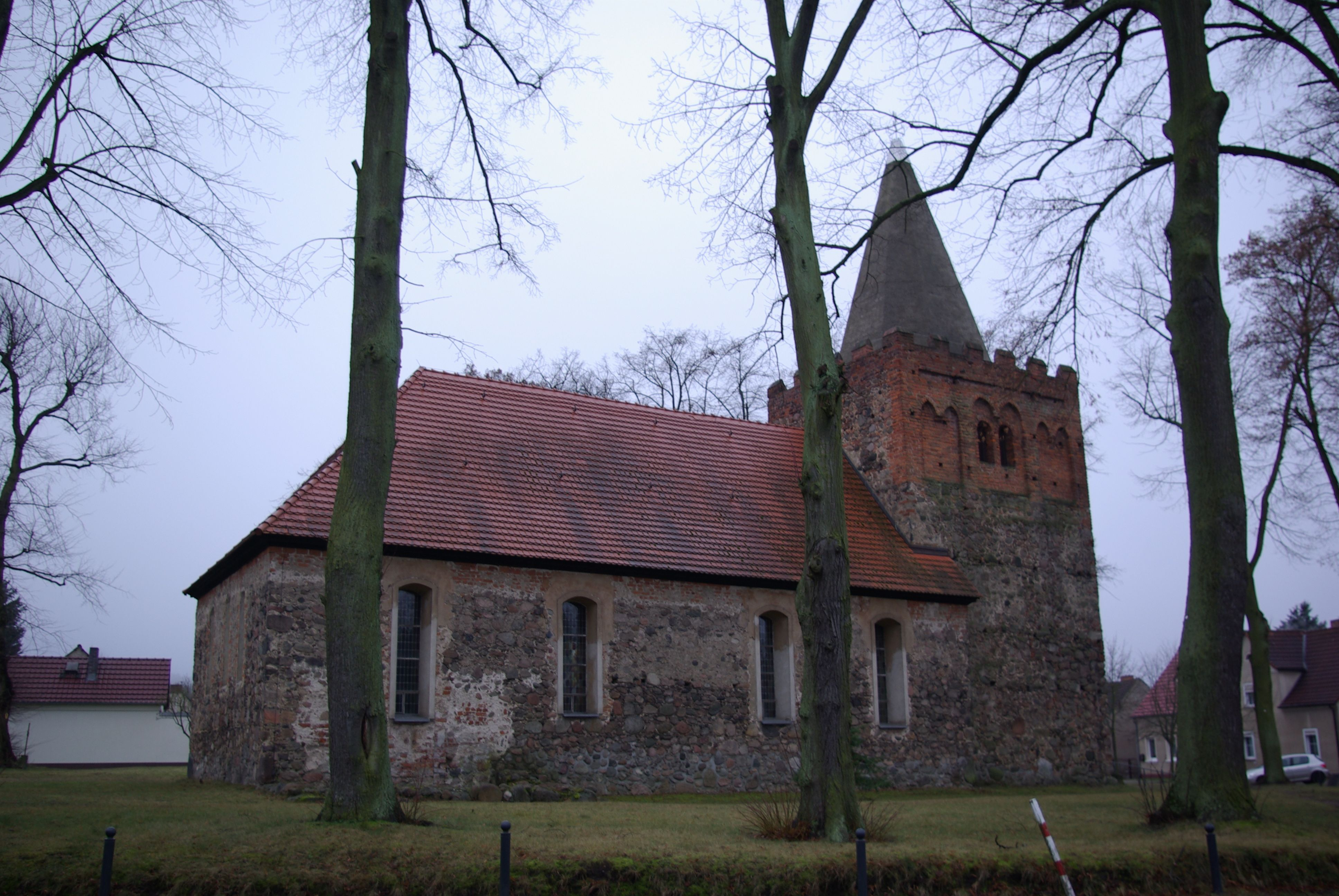 Rauen in Brandenburg. Die Kirche stammt aus dem 15. Jahrhundert und steht unter Denkmalschutz.